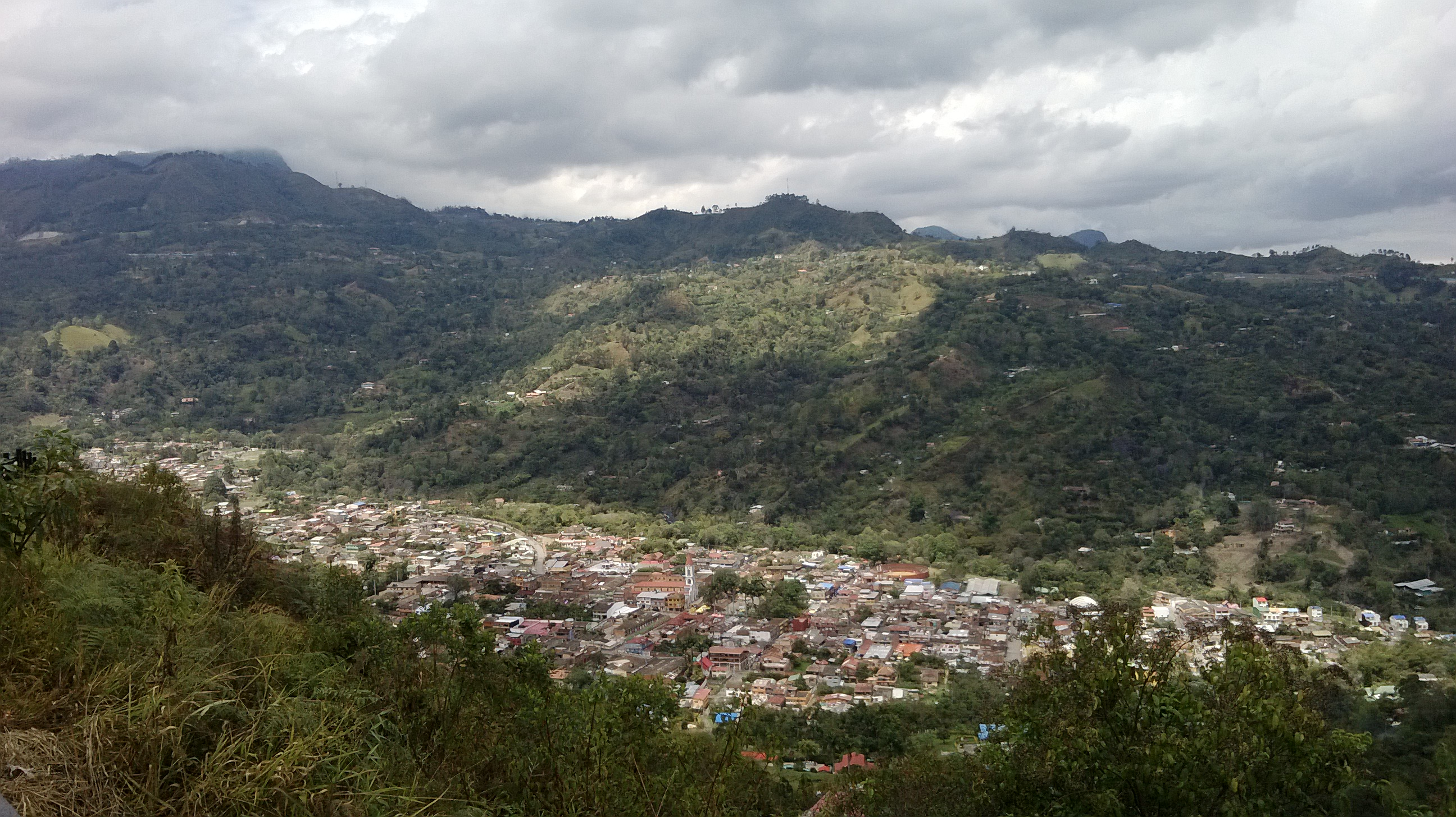 San Francisco de Sales. Vista desde un cerro